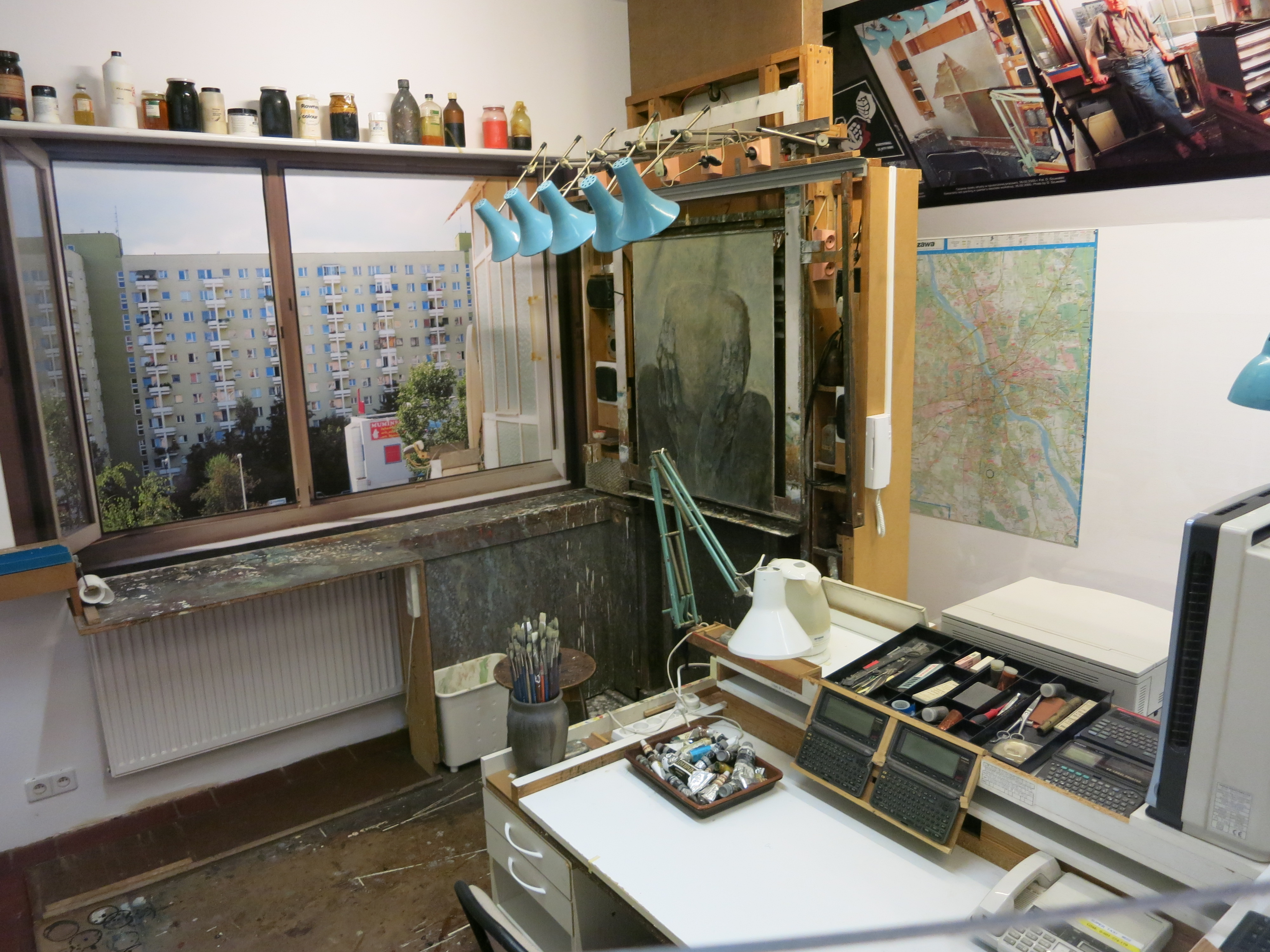 Zdzisław Beksiński Painting studio recreated in the Historical Museum in Sanok, Poland